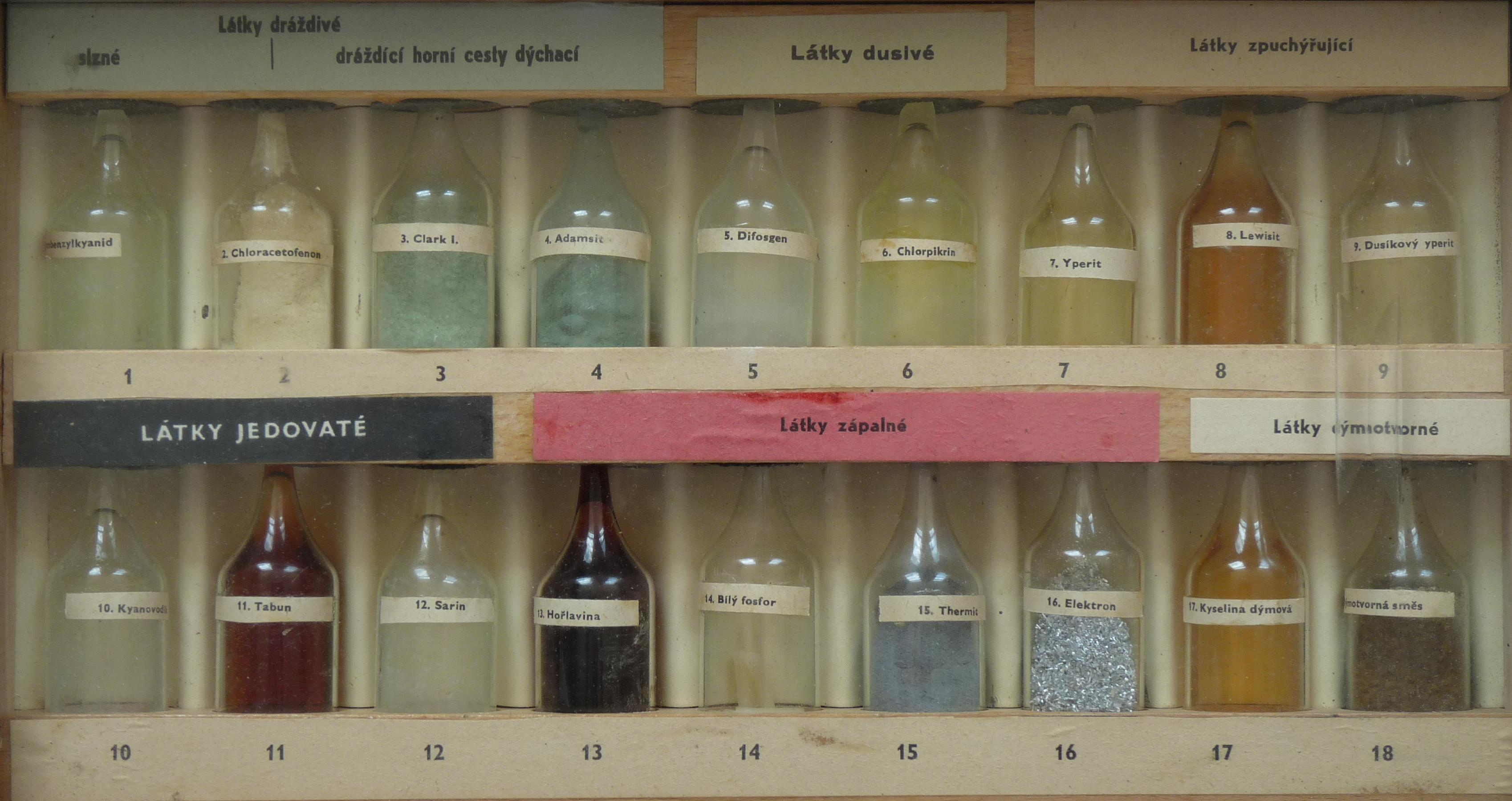 Vzorkovnice BCHL I vnitřek